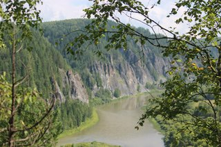 Шорский, Таштагольский район This image is related to the protected area of Russia number 4200024